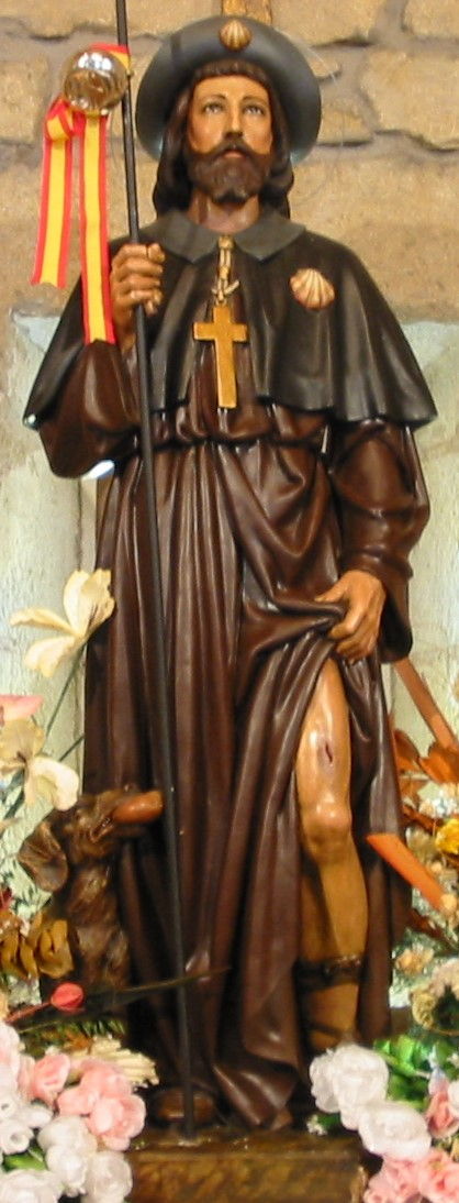 San Roque